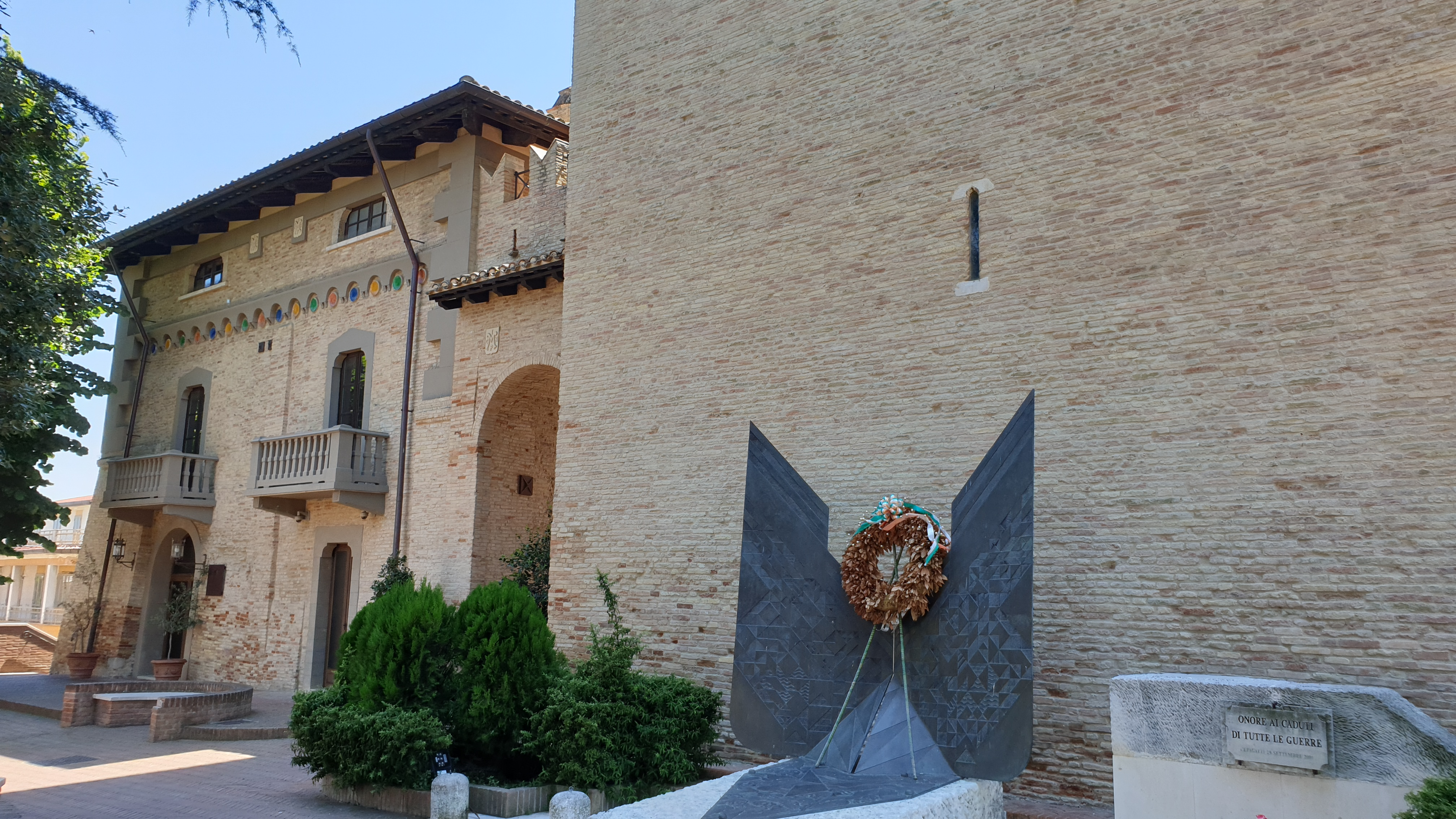 Cepagatti - Monumento ai caduti